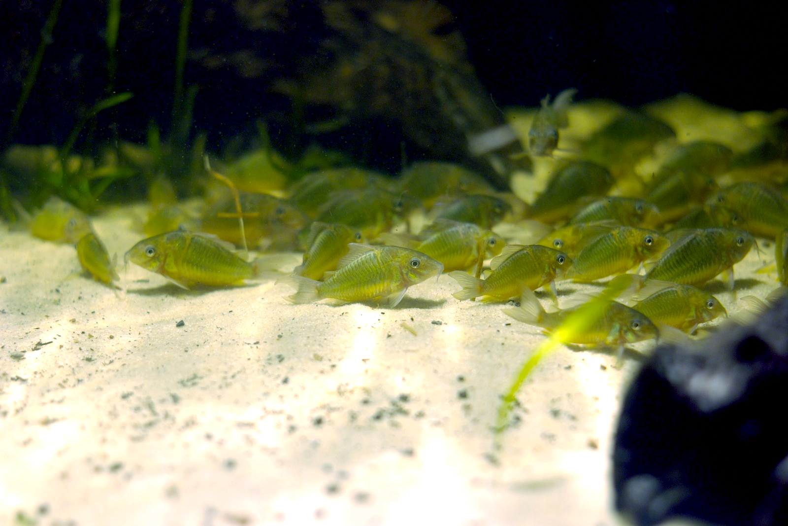 London Zoo